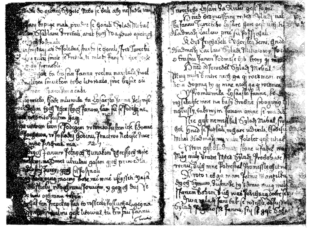 Страницы сборника «исторических песен» Turolúcky kancionál, изданного в Западной Словакии в 1684 году.